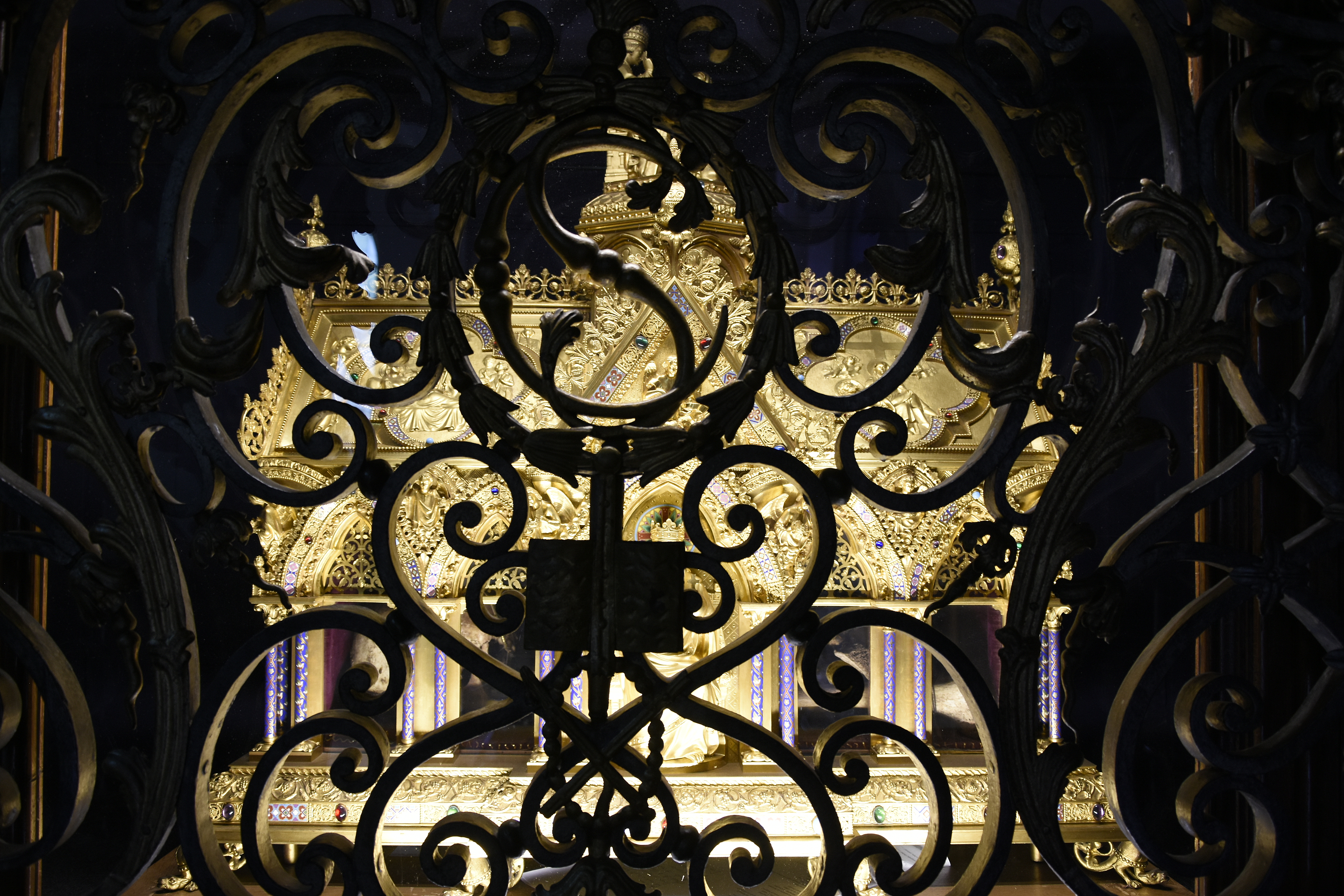 Sint-Claraklooster te Poligny, (Jura), Frankrijk - het schrijn van Nicolette Boëllet, gekend als de heilige Coleta (Frans: Colette)